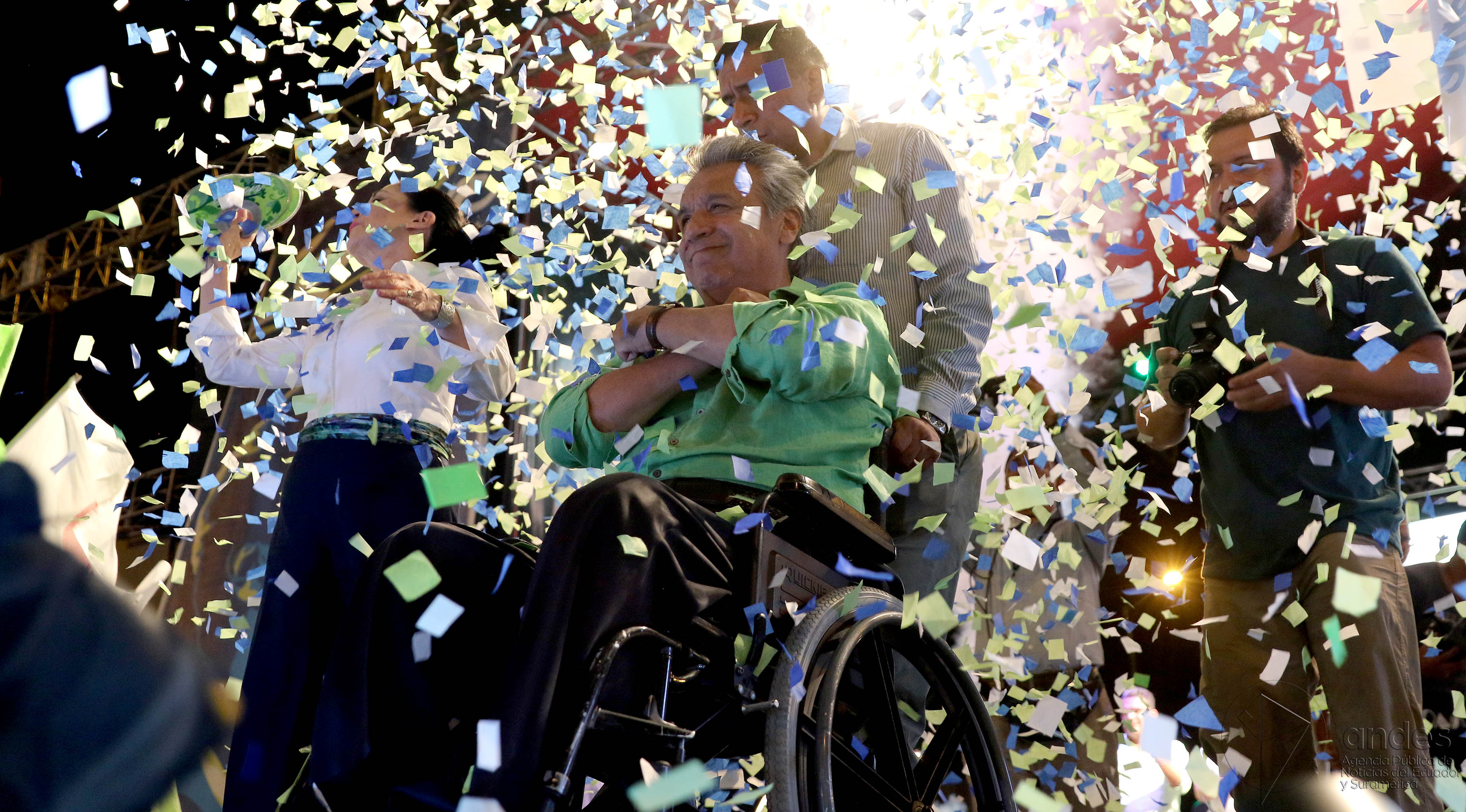 Guayaquil, jueves 16 de febrero del 2017 (Andes).-En Guayaquil, el candidato presidencial Lenín Moreno realizó su cierre de campaña. Foto:Andes/César Muñoz